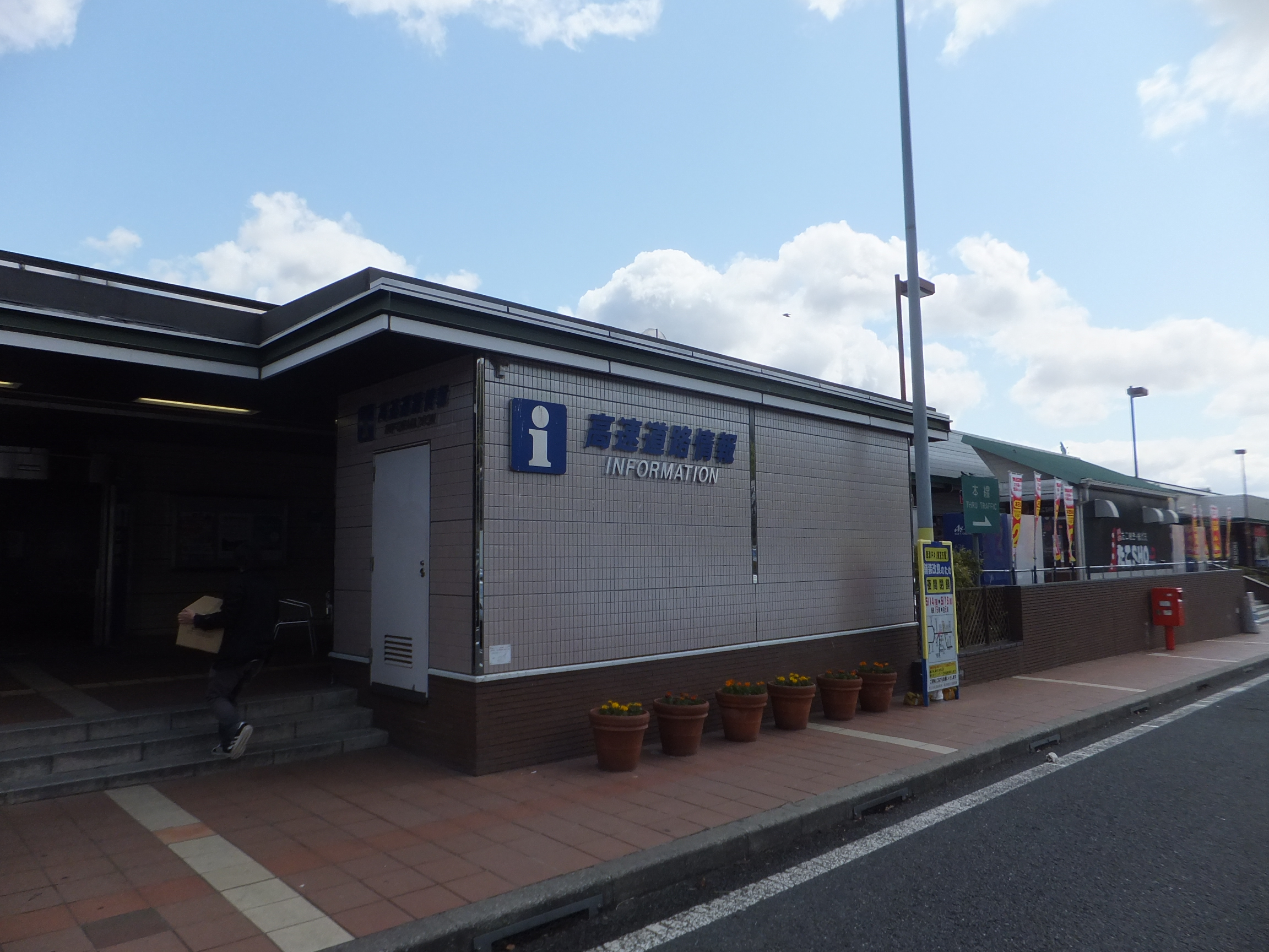 西宮名塩サービスエリア上り線